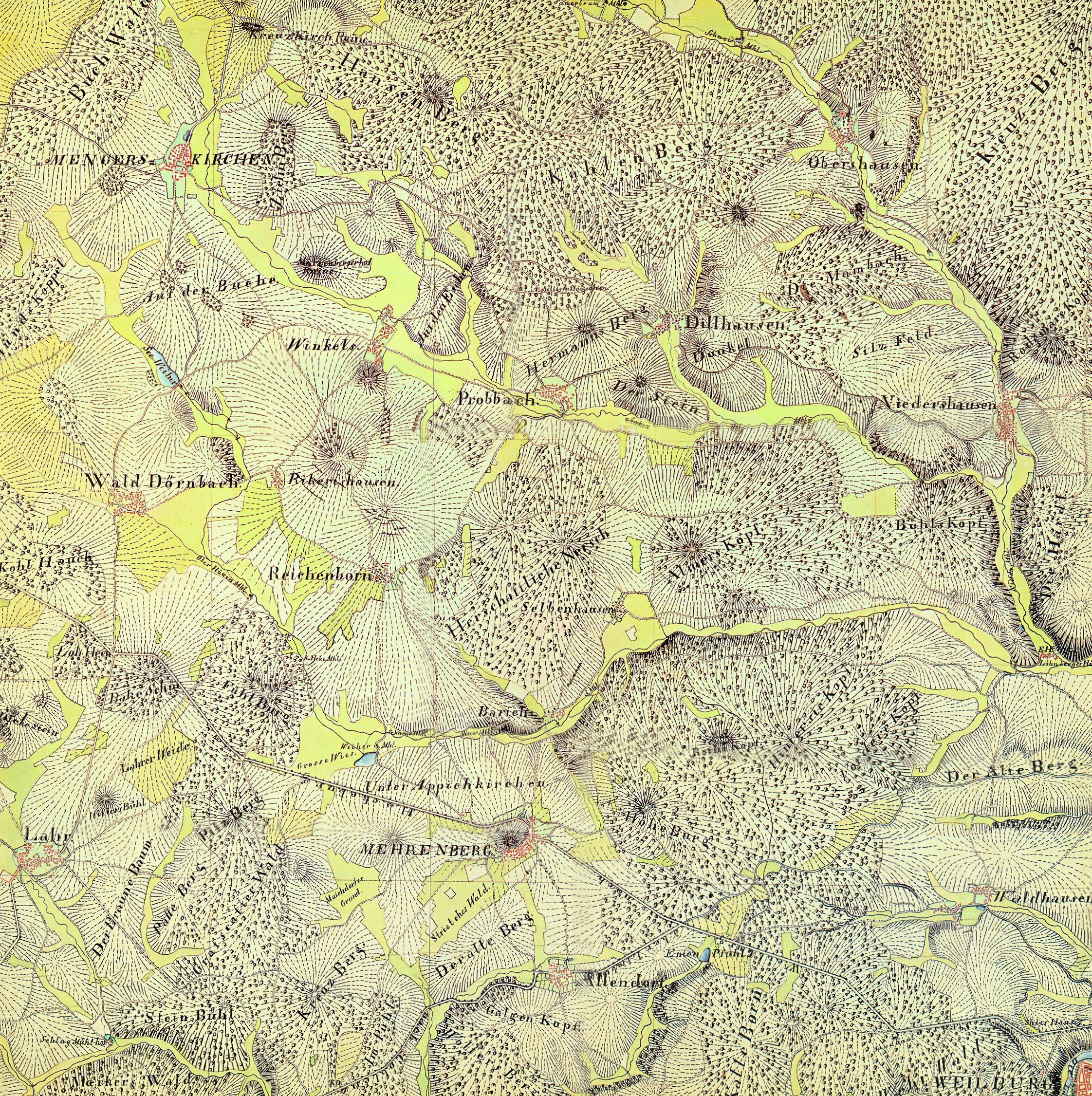 Ausschnitt der Karte 64 Weilburg der Topographische Aufnahme der Rheinlande durch Tranchot und von Müffling. Diese Karte wurde 1819 durch Lieutenant Chorus angefertigt